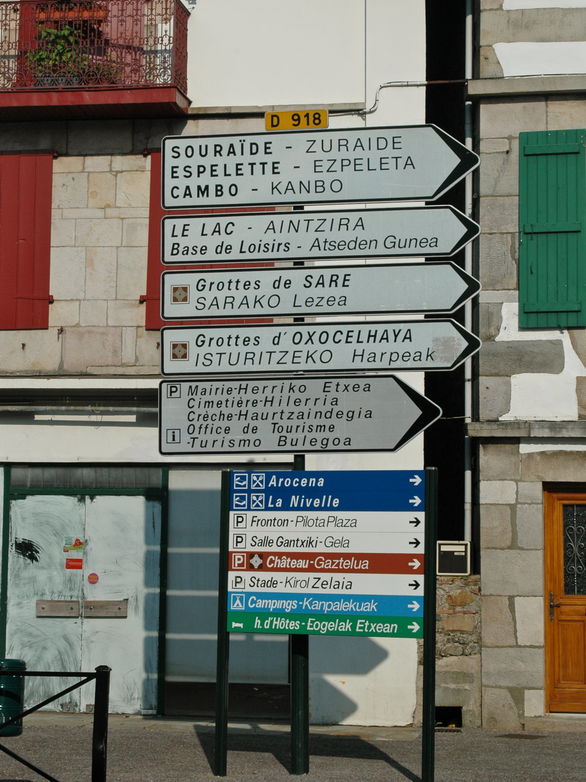 Saint-Pée-sur-Nivelle, panneau bilingue. Photo prise le 08/07/06 par Harrieta171